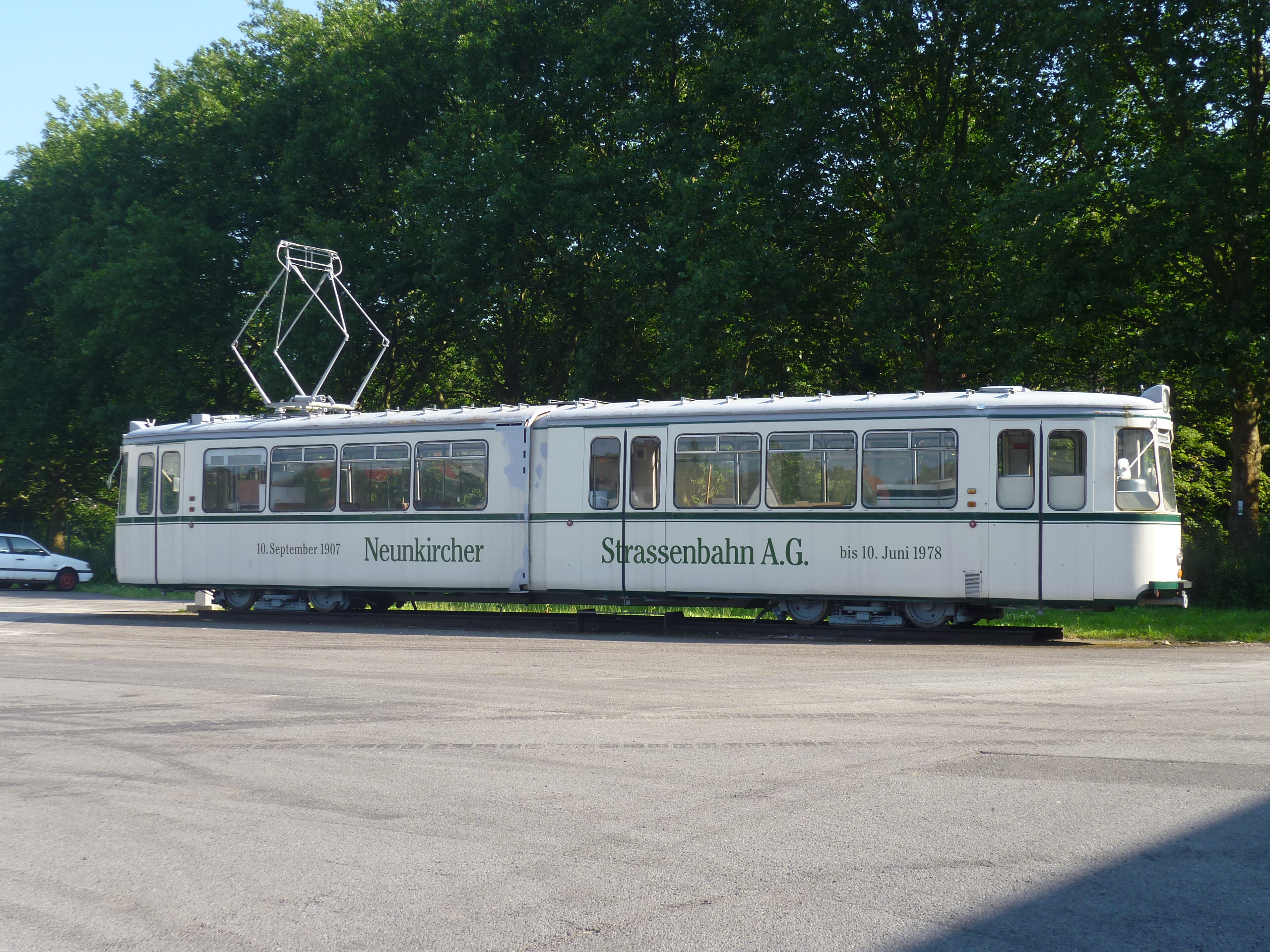 Alter Straßenbahnwagen aus Neunkirchen, Ausstellungsstück auf dem NVG-Gelände